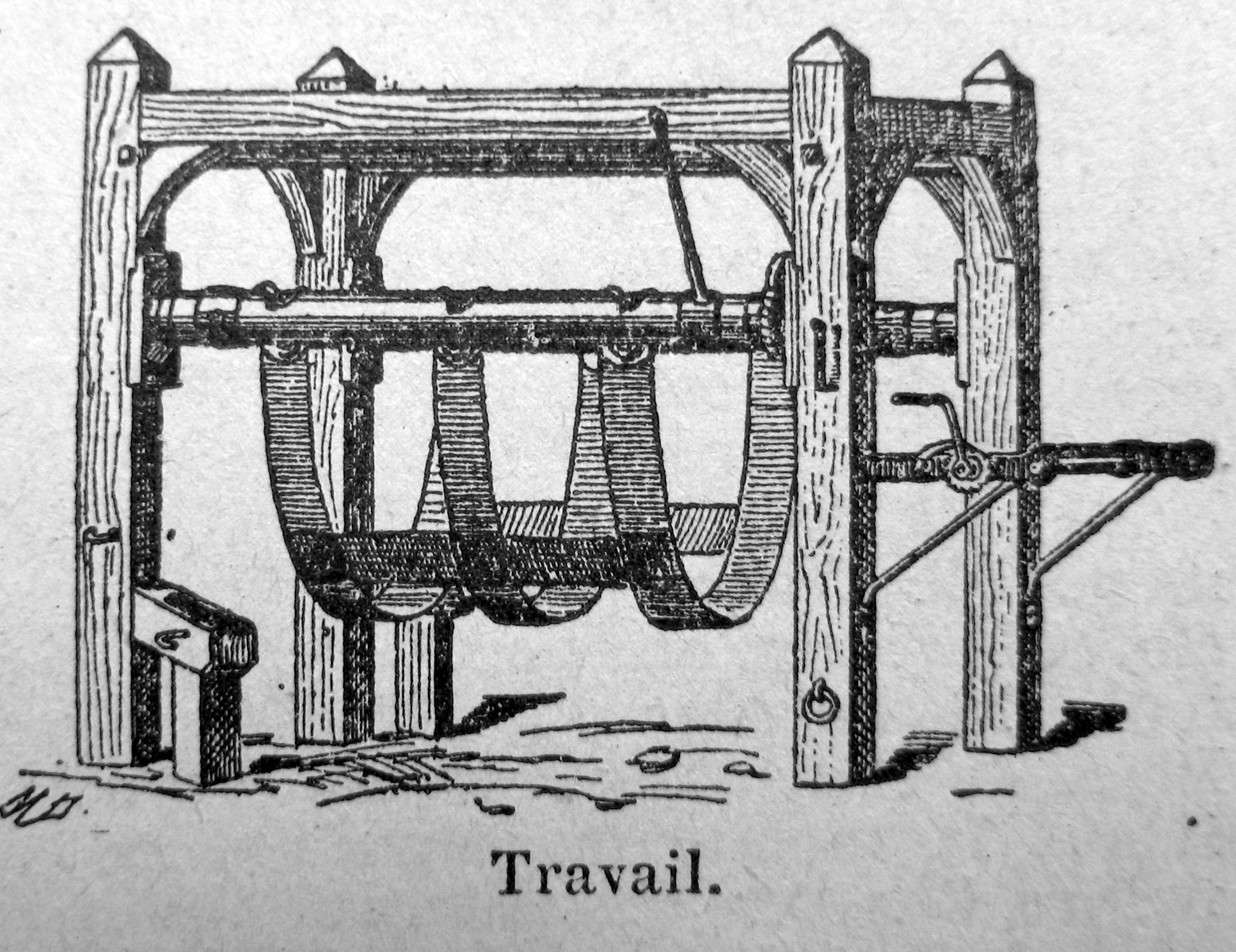 Travail à ferrer - Illustration tirée de la page 1049 de l'édition 1925 du dictionnaire "Nouveau petit LAROUSSE illustré".